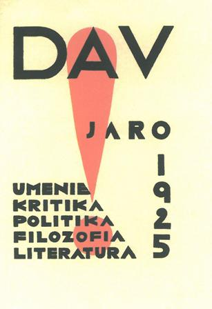 Časopis DAV, 1925